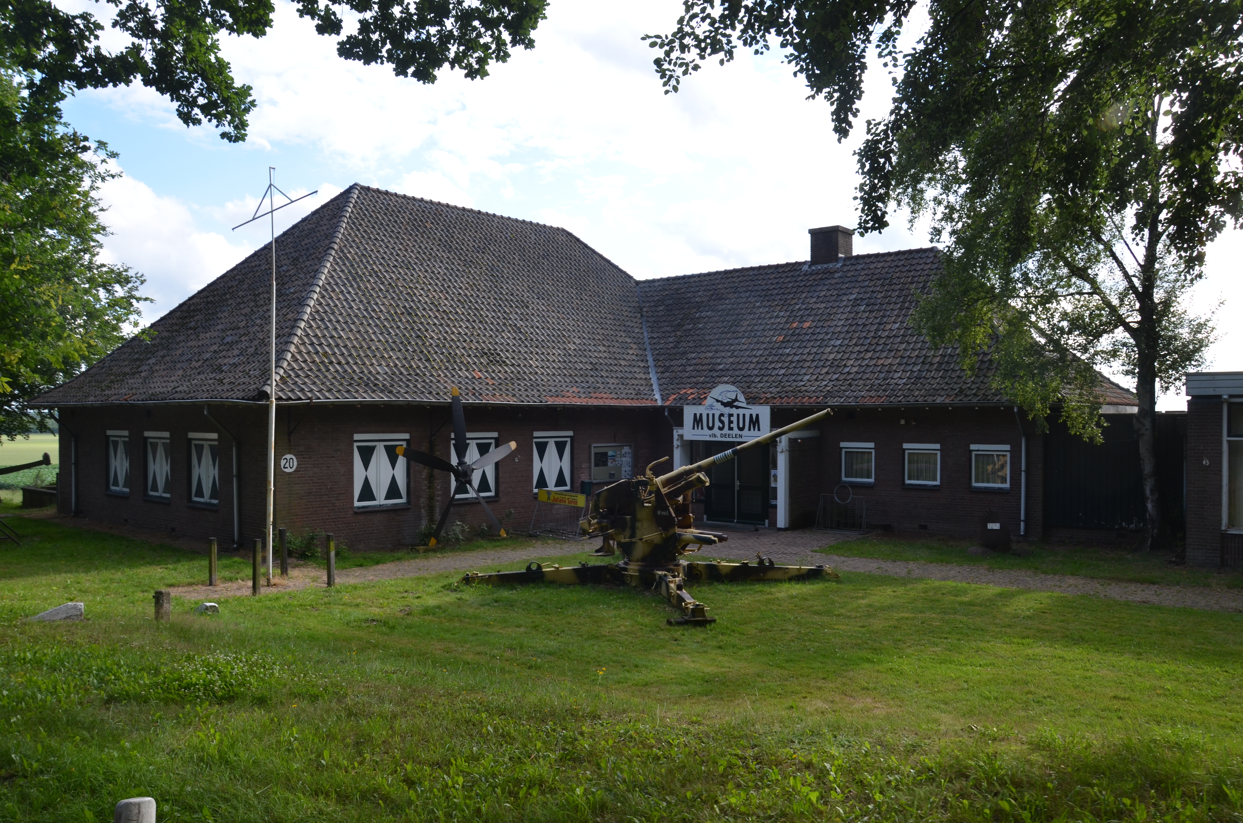 Museum Deelen, in een pand dat onderdeel was van vliegveld Deelen.